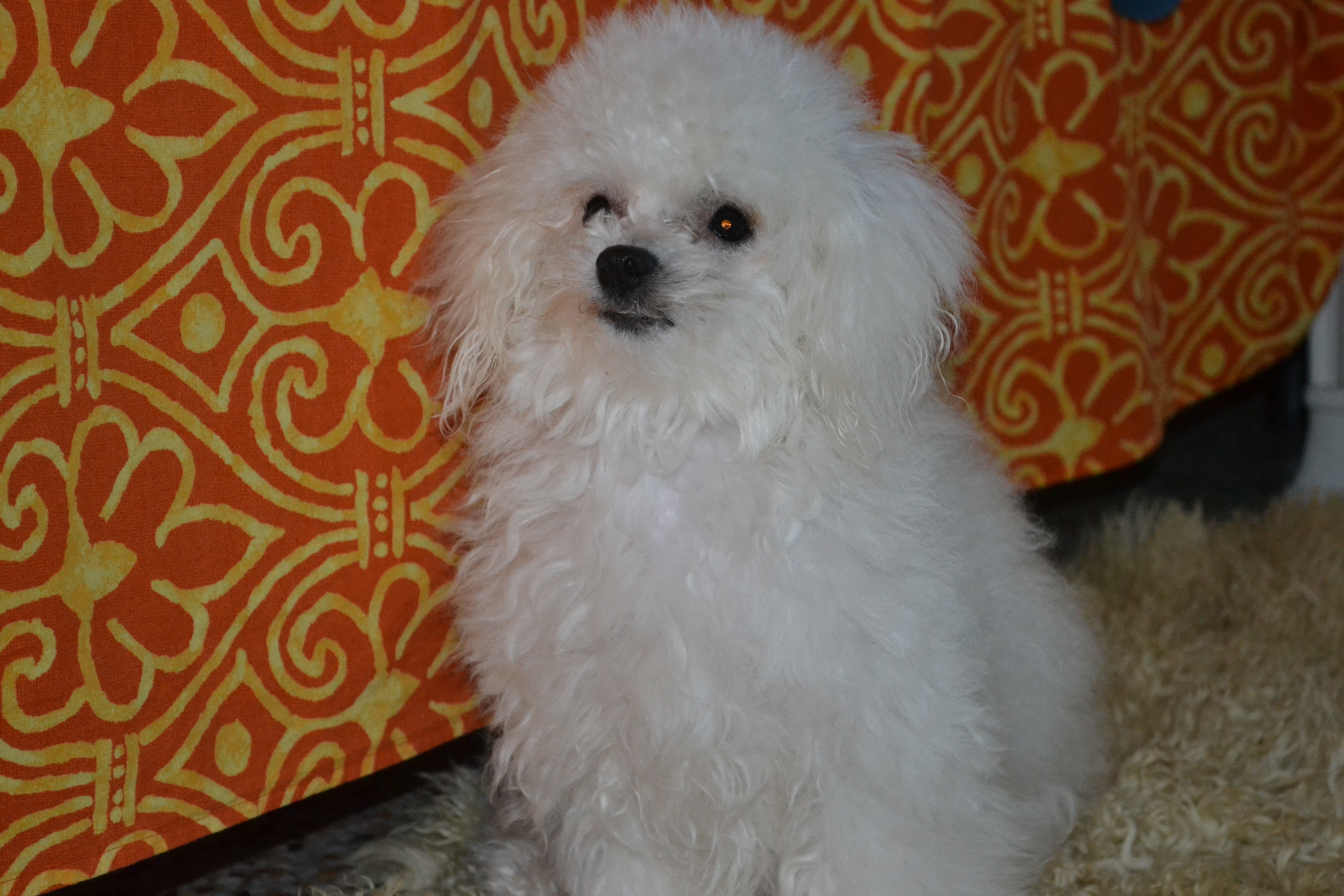 Cagnolina di razza Bolognese; Bijoux ritratta a sette mesi.